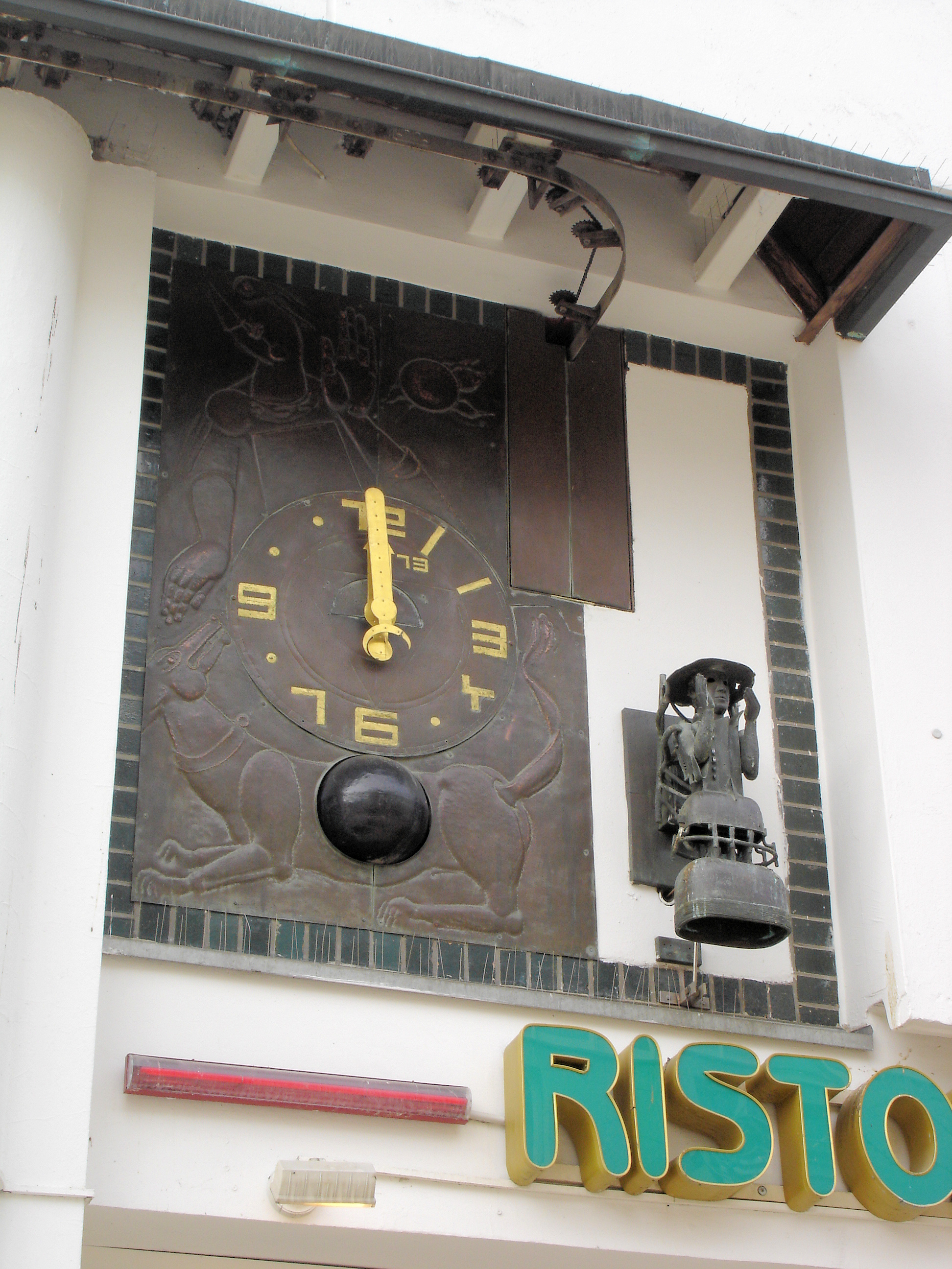 Relief Rostocker Stundenuhr Rostock von Lutz Holland 1986